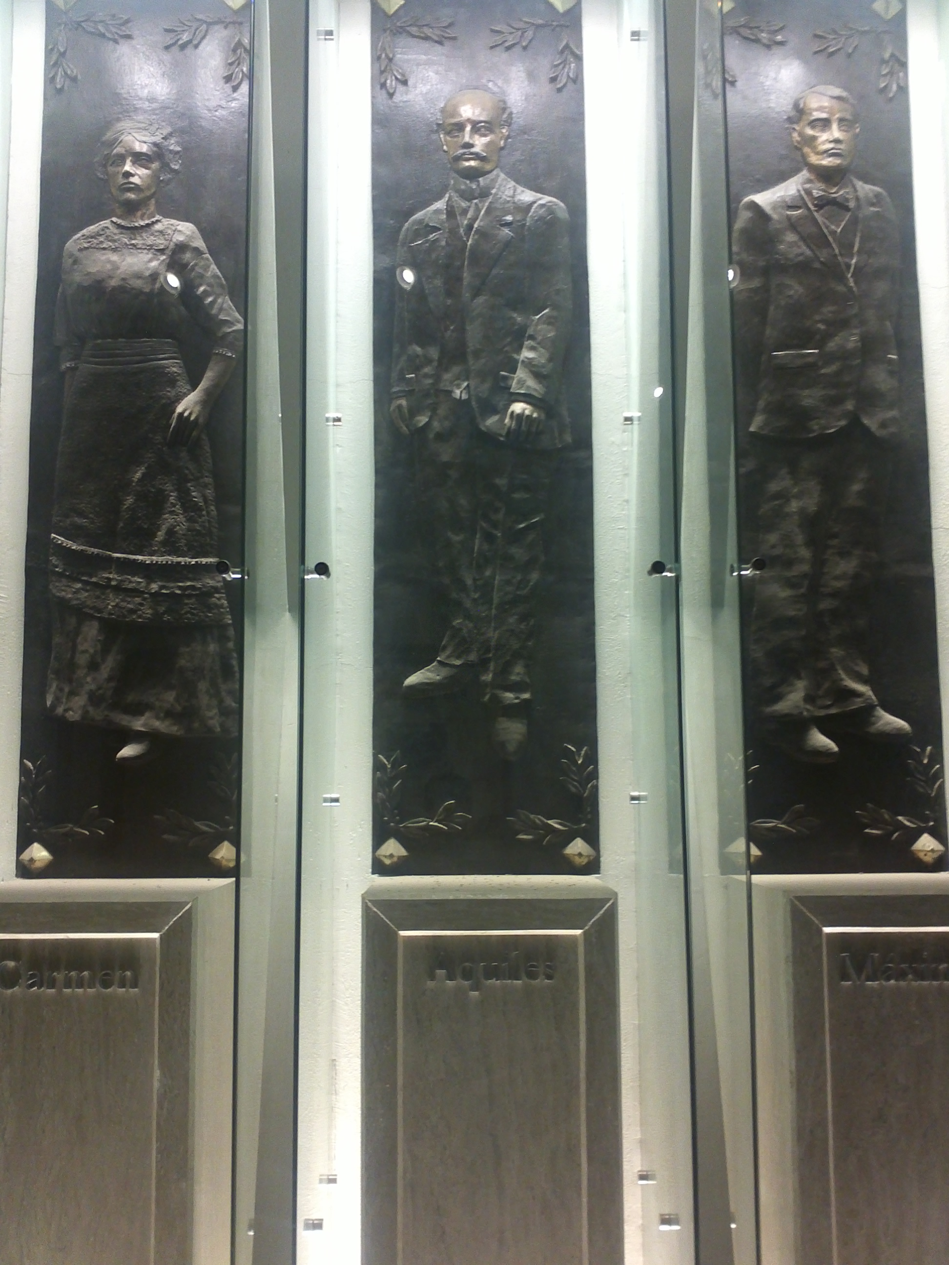 En este lugar descansan bajo honores los restos de los hermanos Aquiles, Máximo y Carmen Serdán.